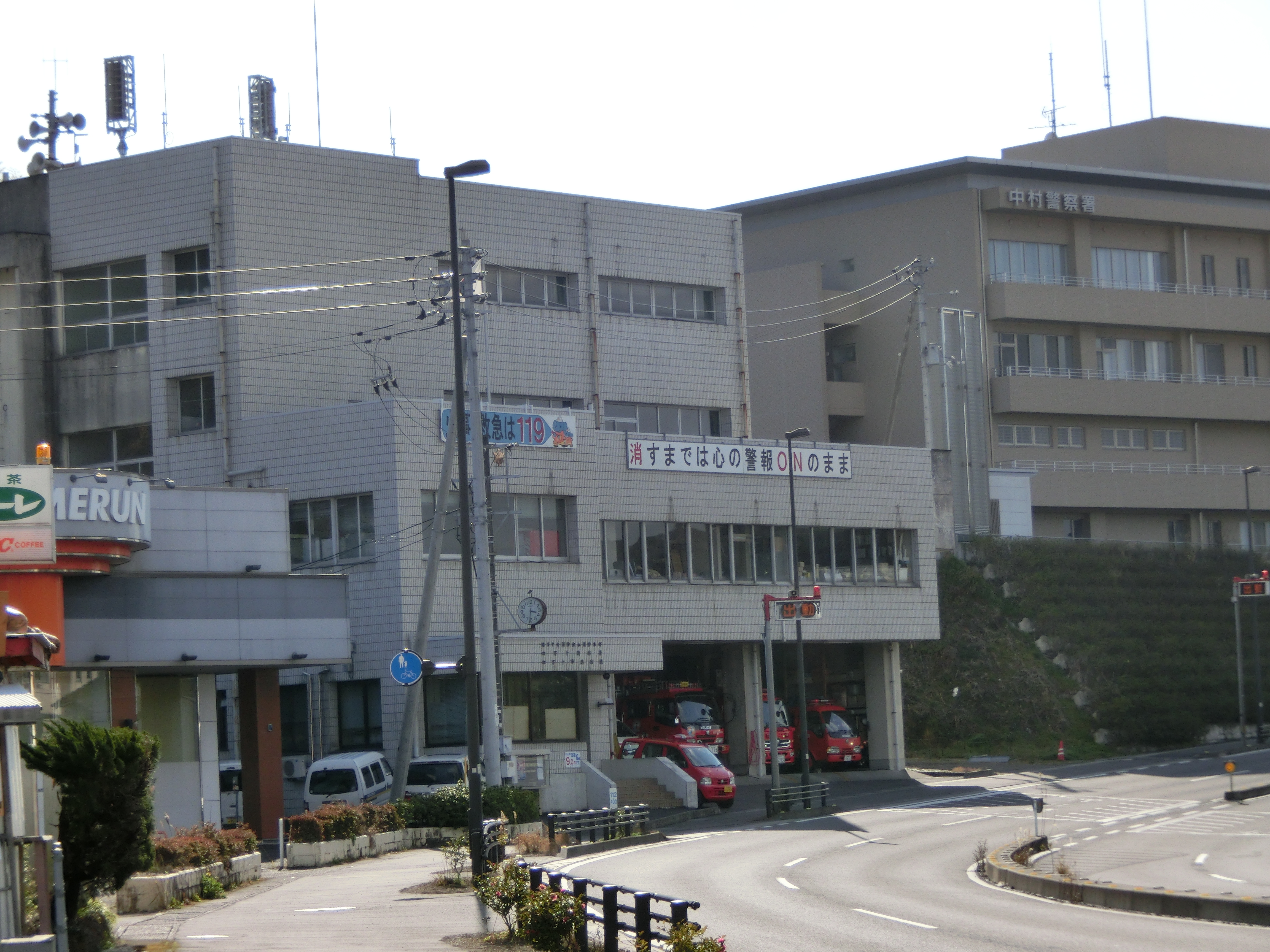 幡多中央消防組合消防本部